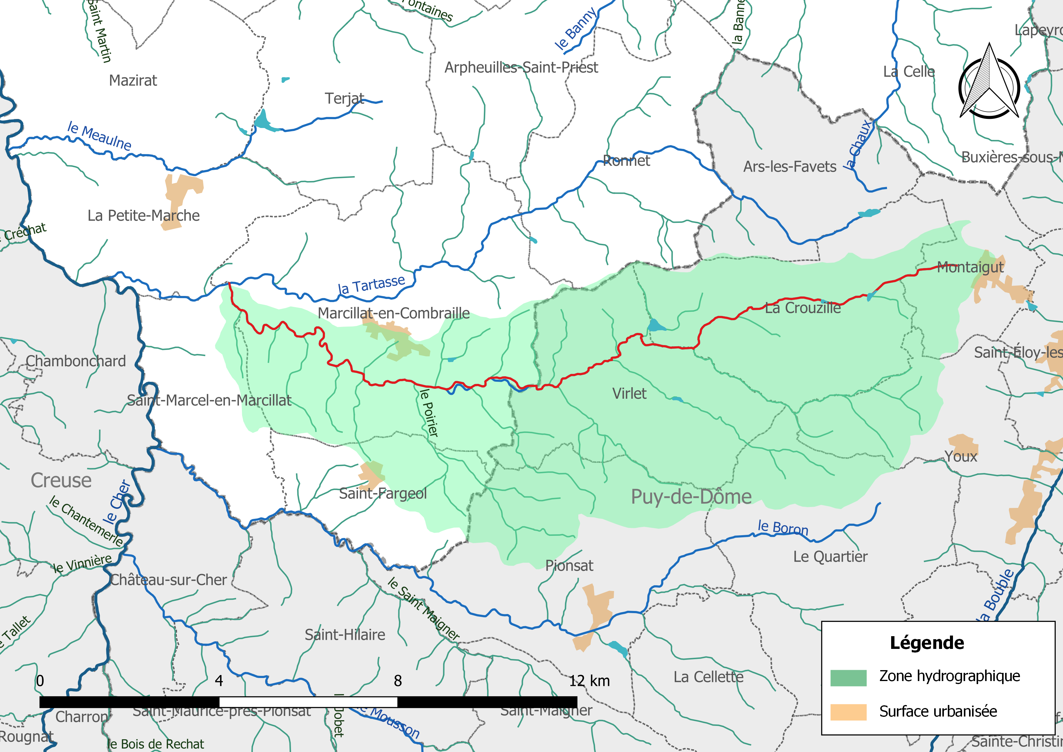 Carte du cours d'eau « le Bouron » (France) et de la zone hydrographique dans laquelle il s'insère.